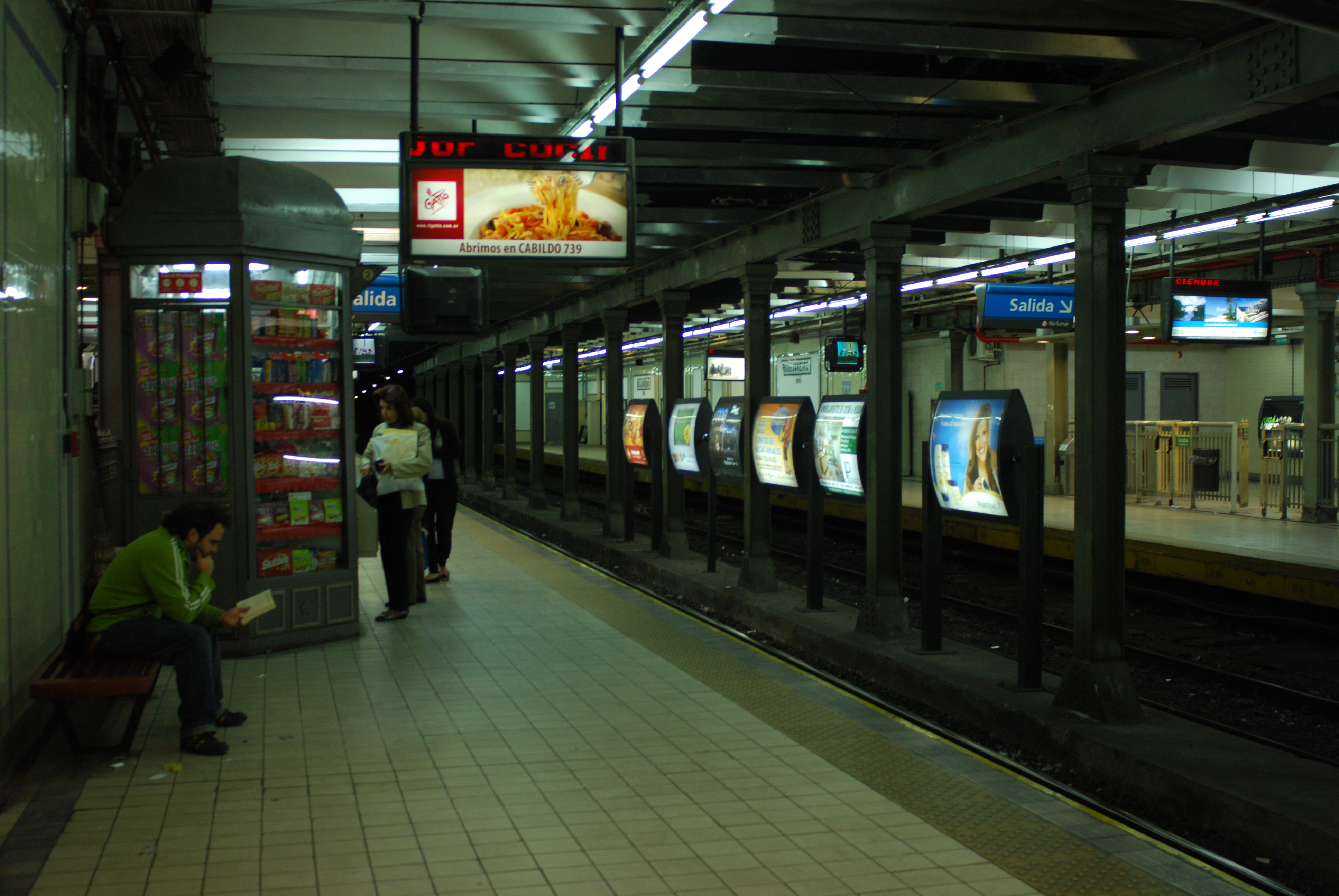 Vista desde el andén de trenes hacia Plaza de Mayo en la estación Rio de Janeiro de la línea A de subtes en Buenos Aires, Argentina (diciembre 2008)